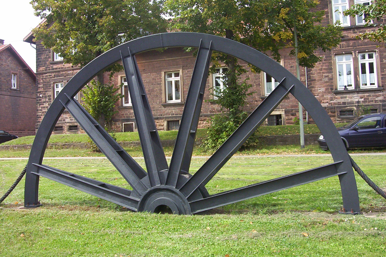 Seilscheibe in Goettelborn